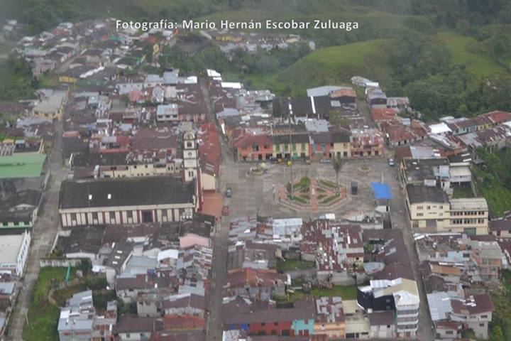 Foto de herveo tomada desde un helicoptero